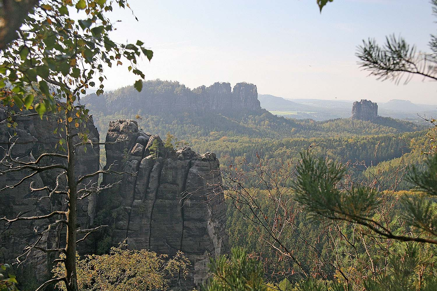 Affensteine in Saxon Switzerland autor: Prazak date: 11. 10. 2006